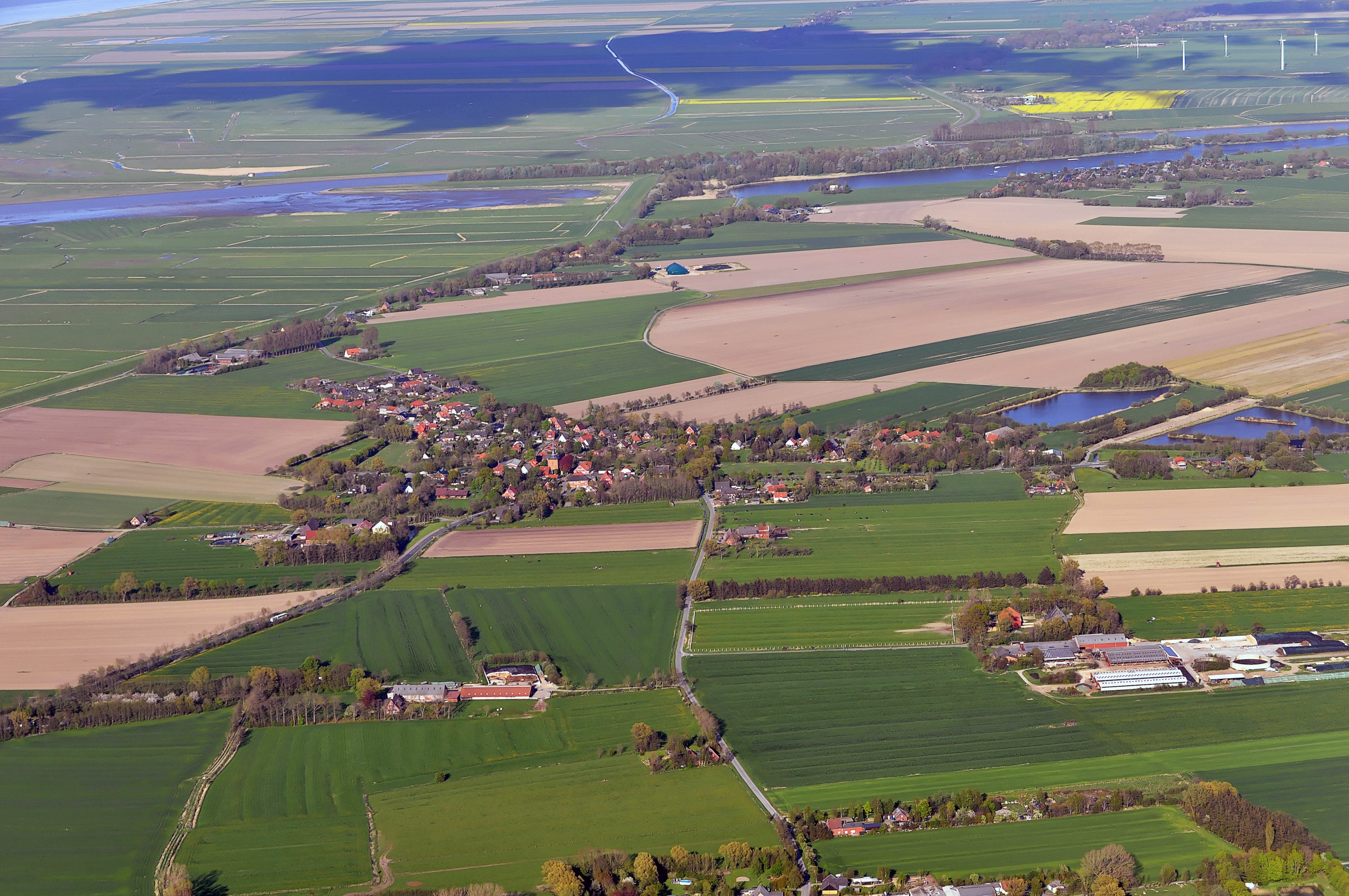 Luftbilder von der Nordseeküste 2012-05